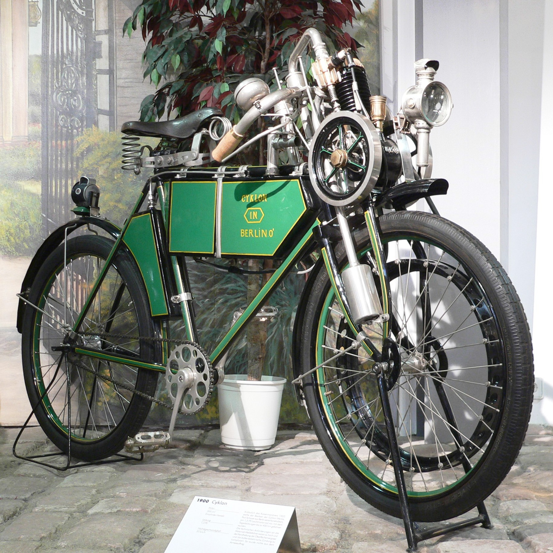 motocycle "Cyklon" (1900) at the Deutsches Zweirad- und NSU-Museum (300 cm³, Einzylinder-Viertakt-Motor, 1,5 PS, 35 km/h)